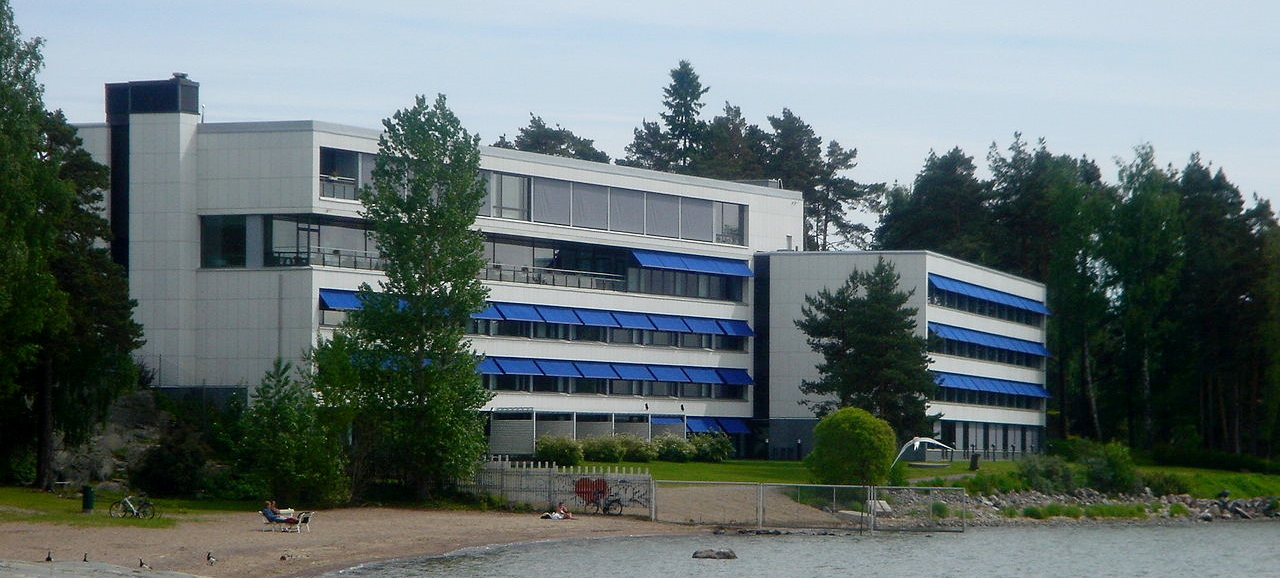 Kalastajatorppa Hotelli Helsingin Mukkniemessä